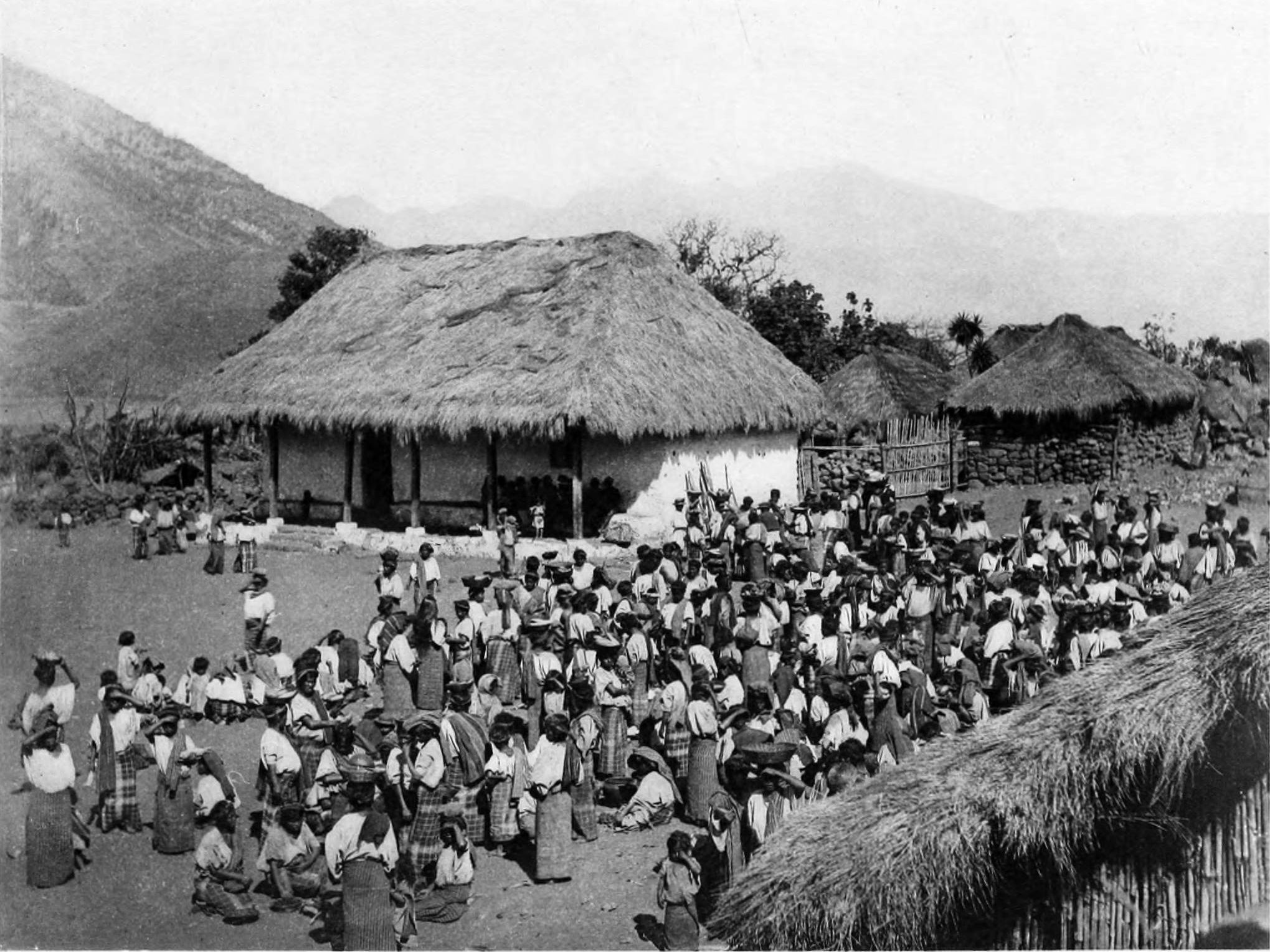 Plaza de Atitlan, foto de Maudslay en 1890.